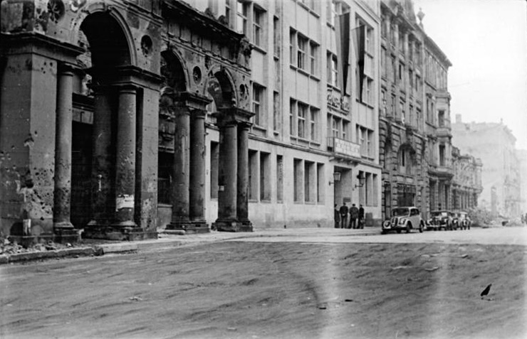 Berlin, Mohrenstraße, Express-Haus ADN-ZB Köhler Nl.-Rie. 23.3.1950 Berlin 1950 Die Mohrenstraße mit den Kolonnaden [Berlin, Mohrenstraße.- Kolonnaden und "Express-Haus"]